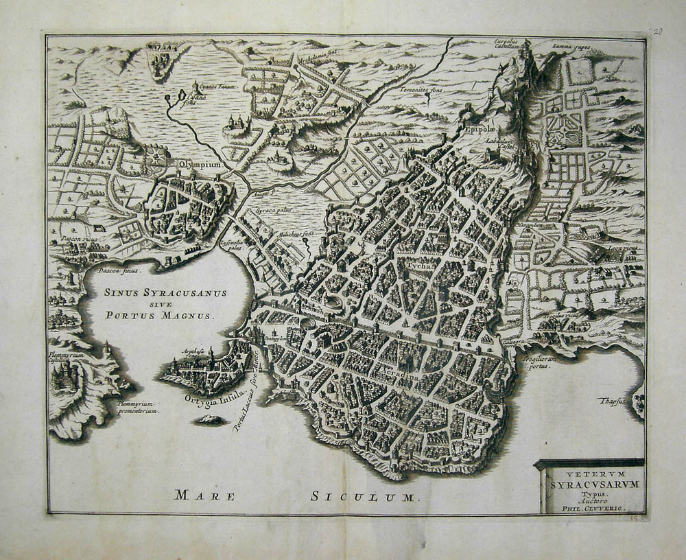 Antica mappa disegnata dai viaggiatori stranieri in terra di Sicilia